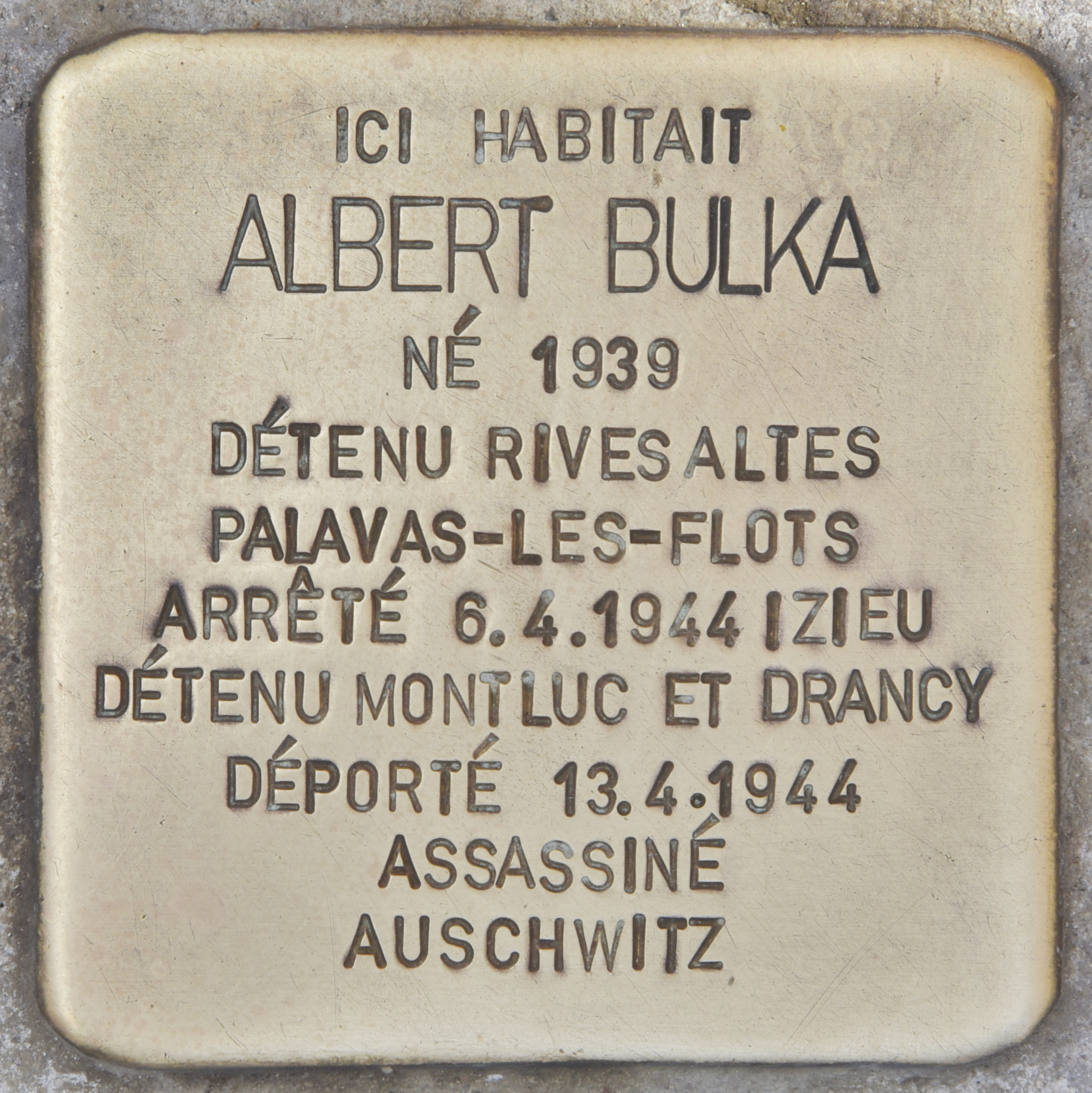 Stolperstein für Albert Bulka